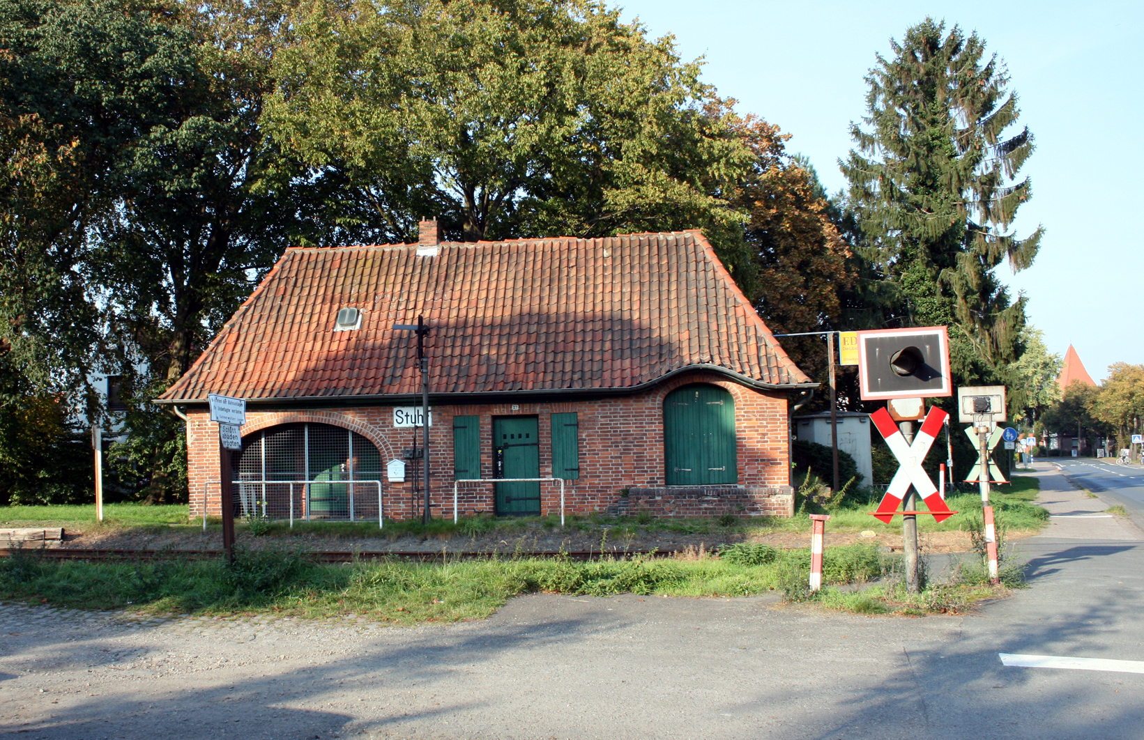 Bahnhof Stuhr im Jahr 2007